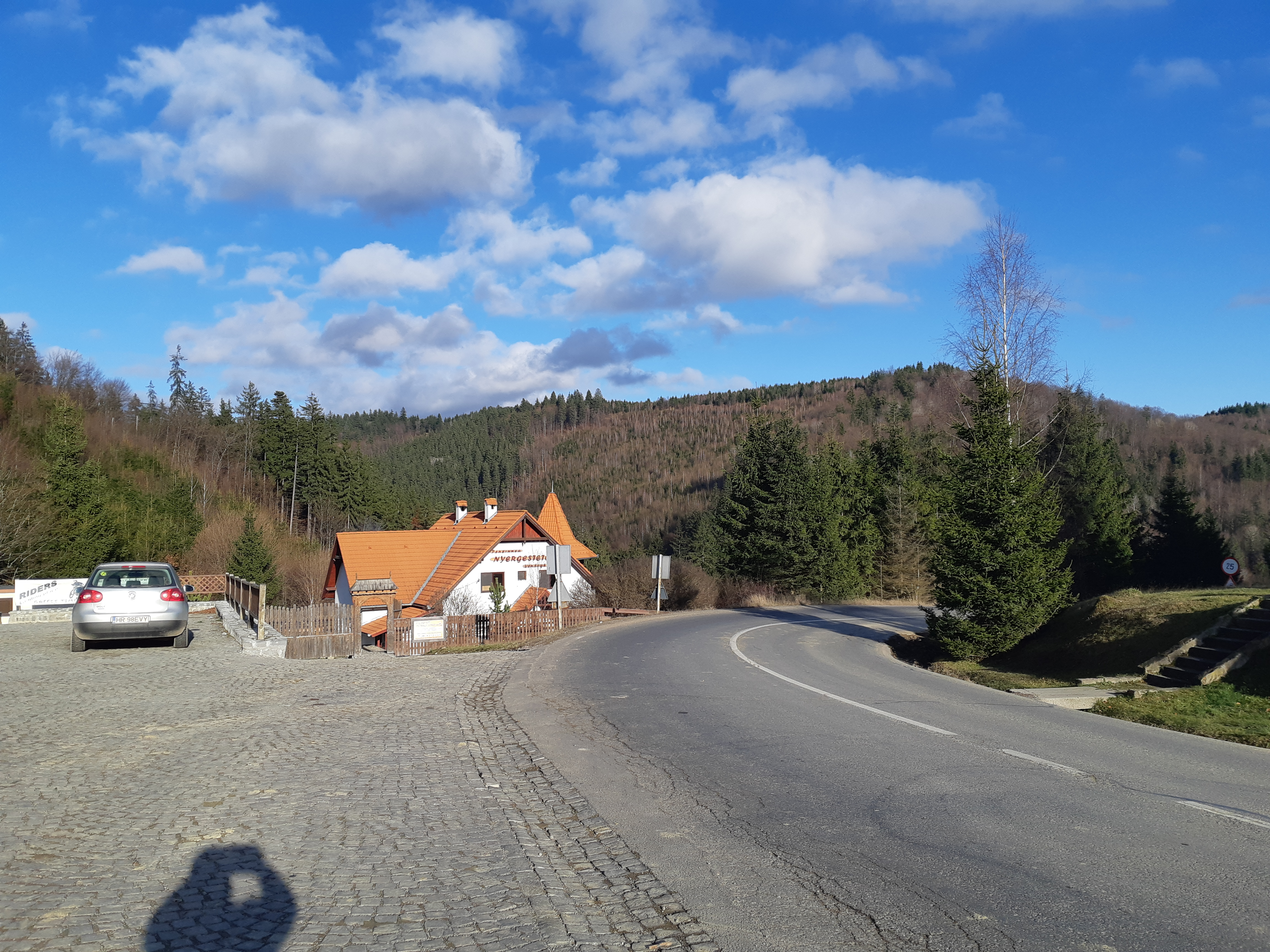 Pasul Caşin: versantul spre Depresiunea Caşin.